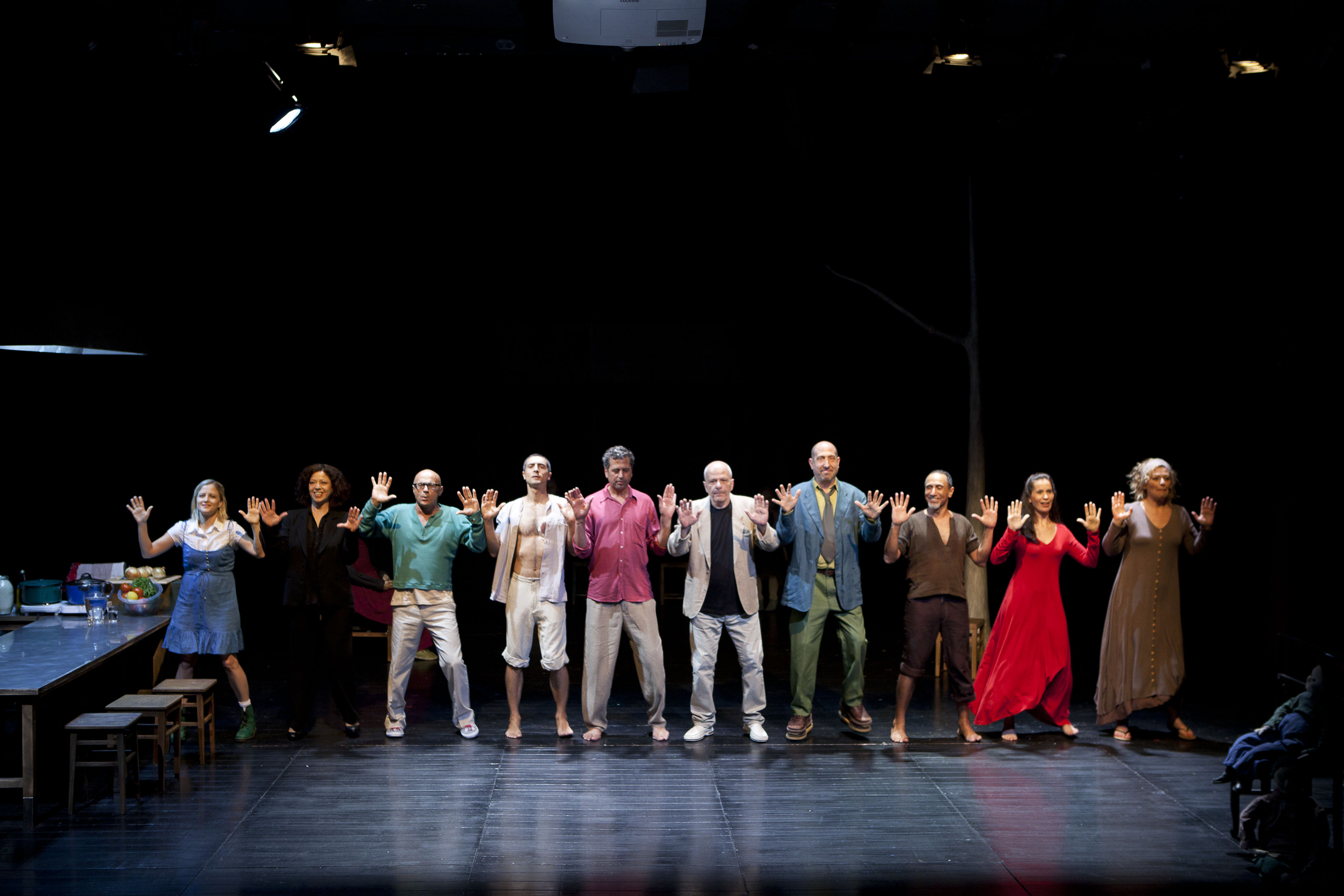 Haifa Theatre established in 1961 The pictures were given to Commons by Haifa Theatre ` תיאטרון חיפה הוקם בשנת 1961. הוא התיאטרון העירוני של העיר חיפה, והתיאטרון העירוני הראשון בישראל. התיאטרון הוקם ביוזמתו של אבא חושי ראש עיריית חיפה סצנת הפתיחה של ההצגה "איש ואשה אחת" התמונות נמסרו להעלאה לויקיפדיה באדיבות תיאטרון חיפה Theater Photograph צלם זראר אלון